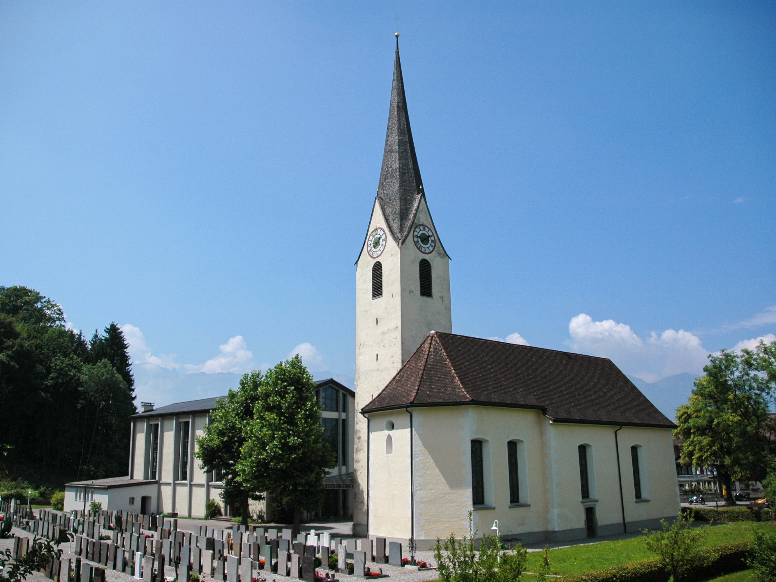 Nofler Pfarrkirche "Maria Heimsuchung"